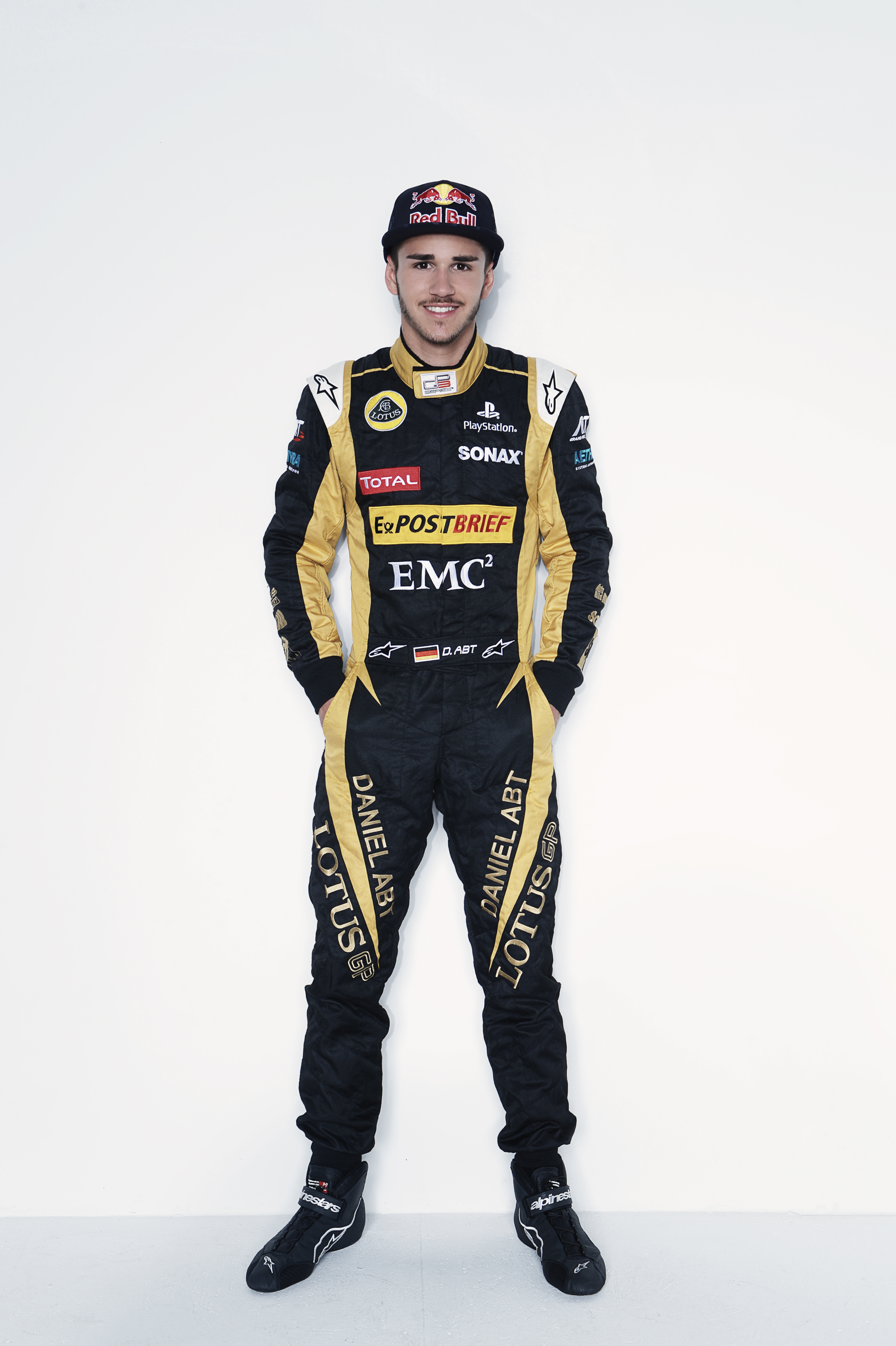 Daniel Abt, GP3-Pilot, Saison 2012, Motorsport, Formel